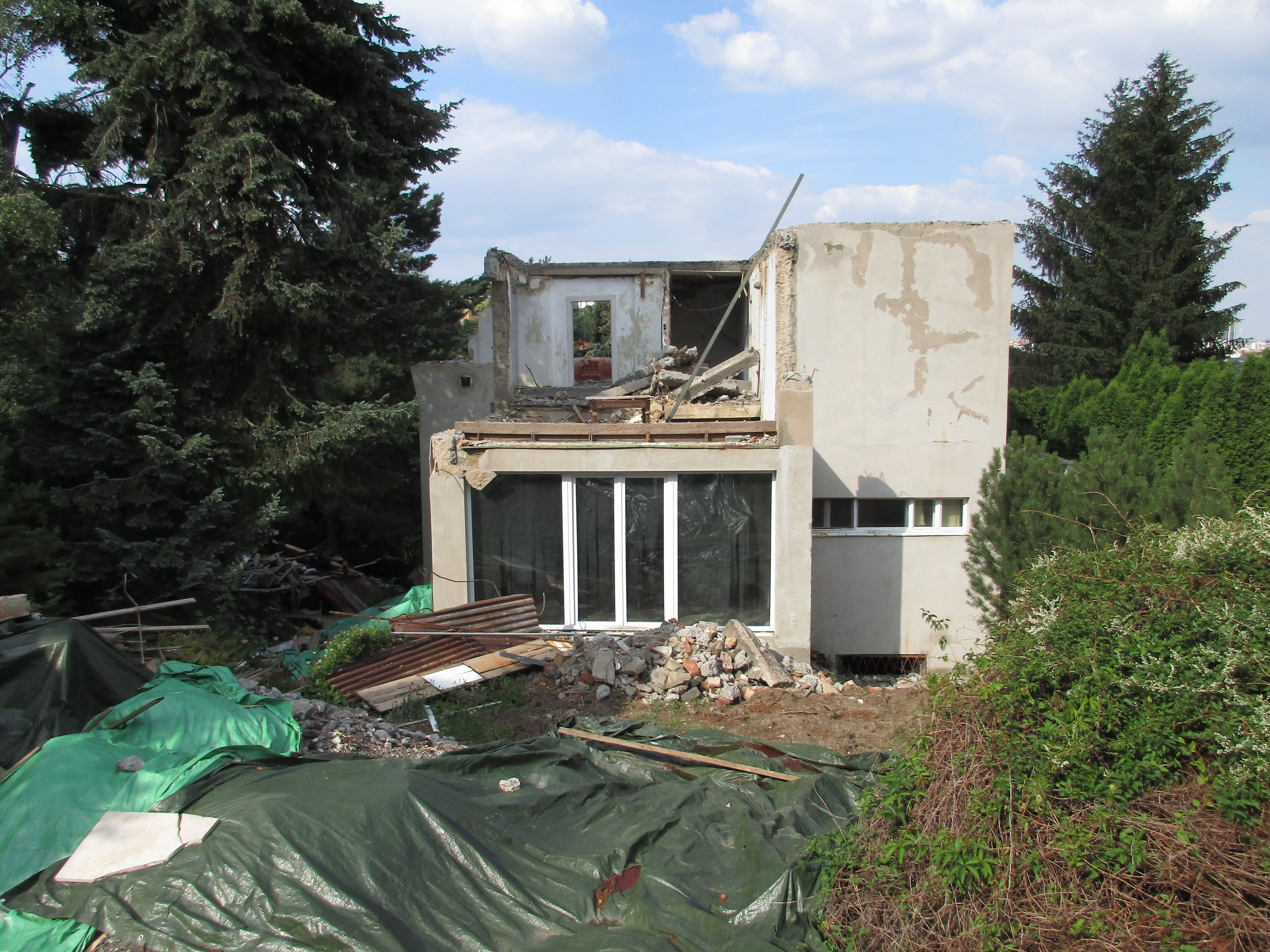 U Dívčích hradů 1905/20, Praha 5 - Smíchov.